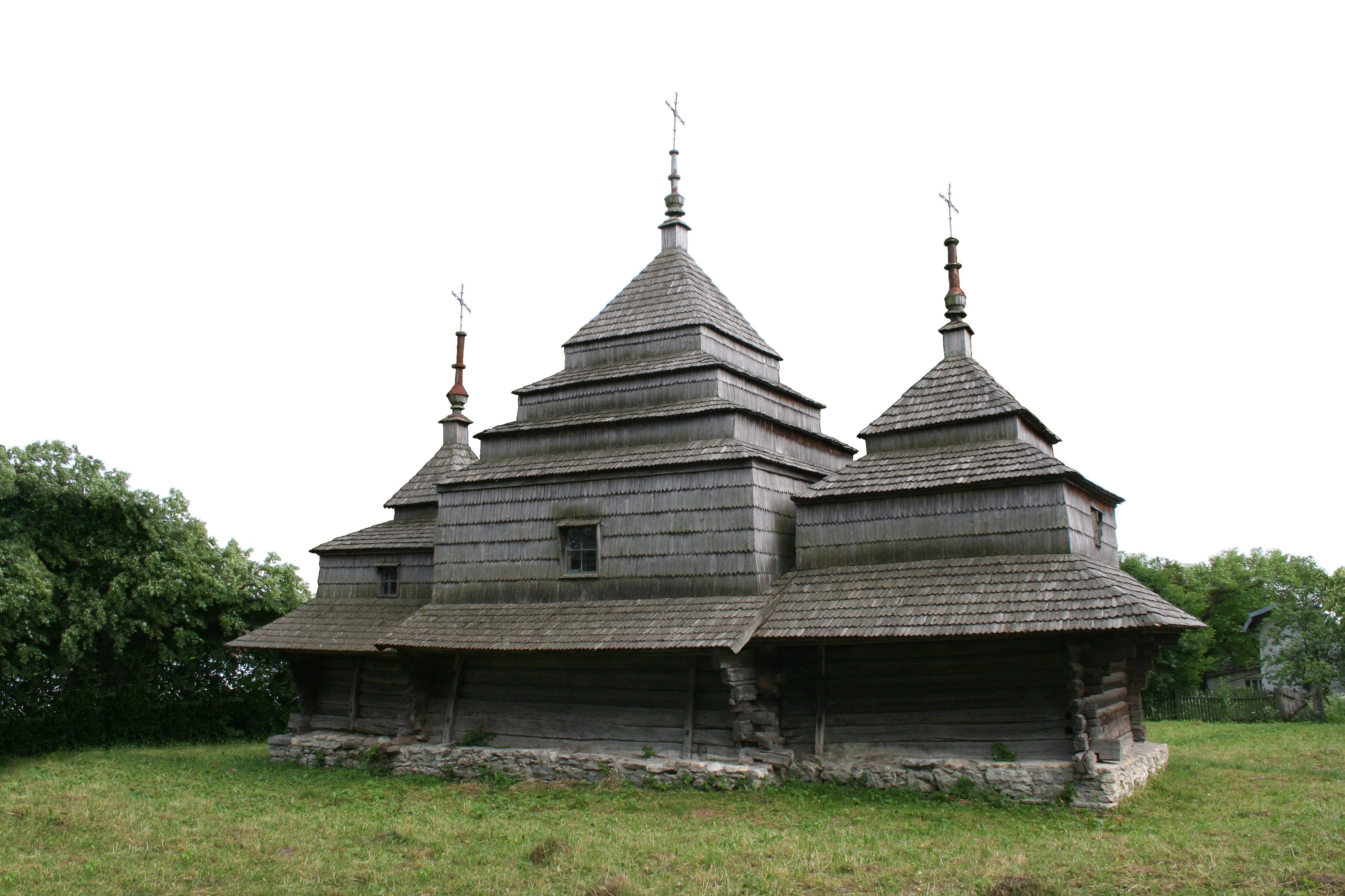 Церковь св. Василия XVI ст., Ивано-Франковская обл, Рогатинский р-он, с.Черче